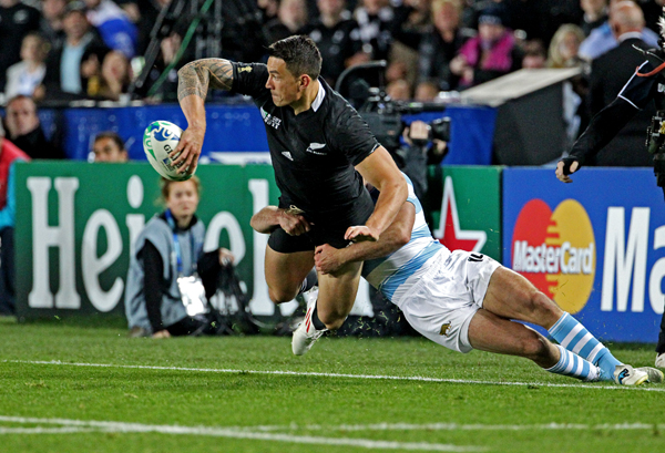 COUPE DU MONDE DE RUGBY 2011 NOUVELLE ZELANDE ARGENTINE